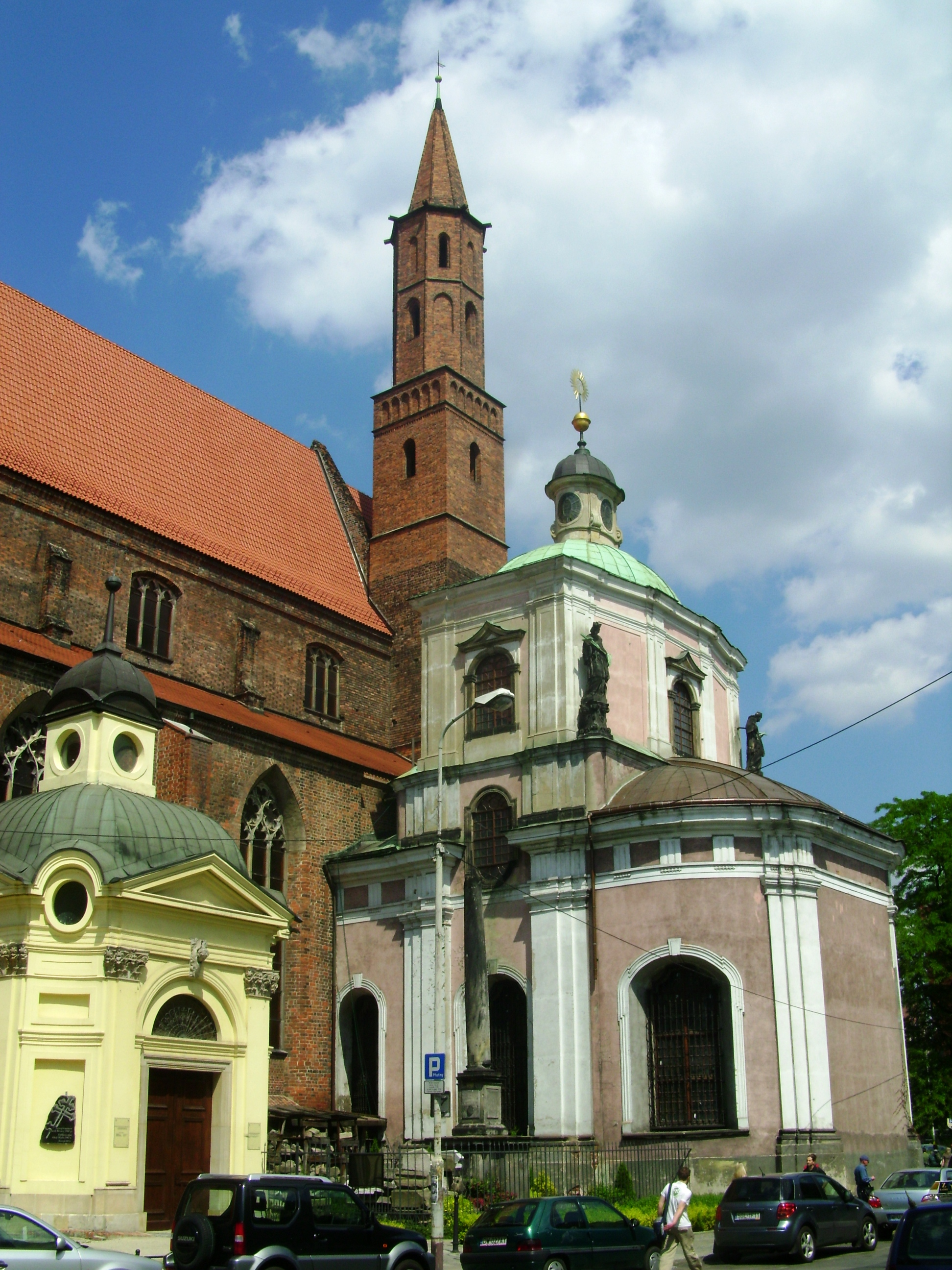 Hochberg-Kapelle an der St. Vincentkirche in Breslau